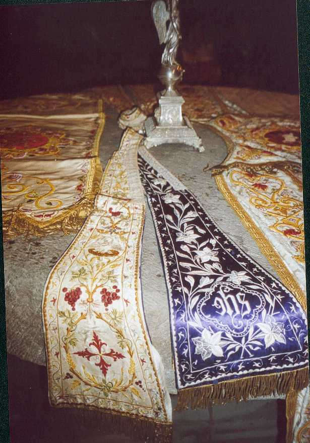 étole brodée, église Saint Mansuy Fontenoy-le-Château